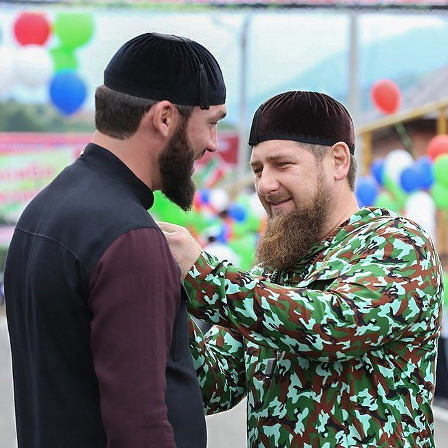 Награждение Главой Чеченской Республики, Героем России Рамзаном Ахматовичем Кадыровым почётным званием "Заслуженный строитель ЧР" руководителя оперативного штаба по ликвидации последствий стихии в Шатойском районе Магомеда Хожахмедовича Даудова This file, which was originally posted to was reviewed on 1 June 2017 by the administrator or reviewer Daphne Lantier, who confirmed that it was available there under the stated license on that date.